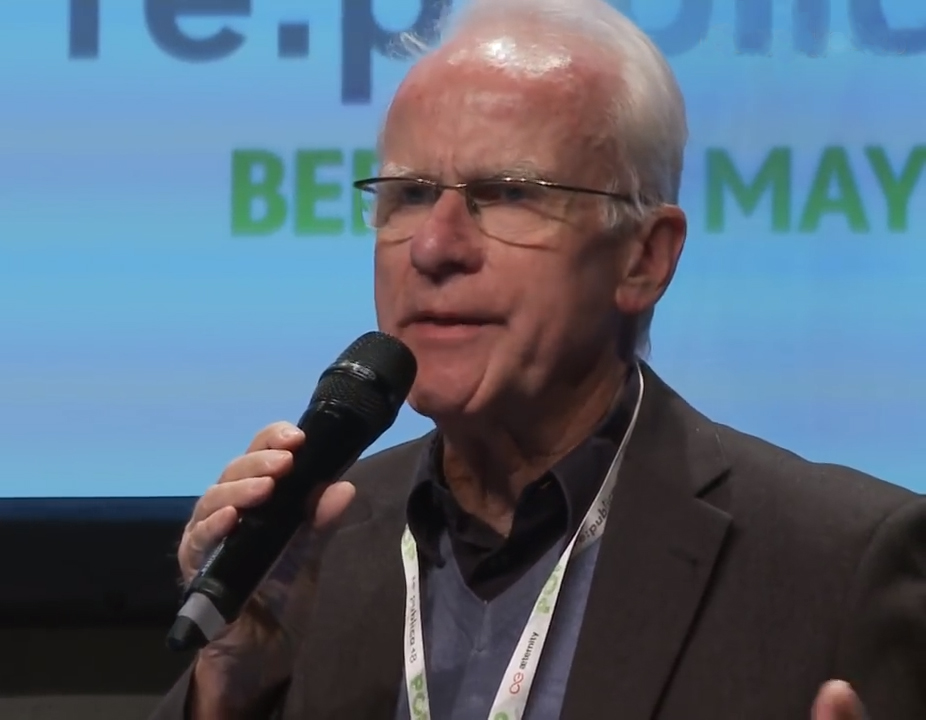 Vorsitzender des Vorstands, Senator a. D